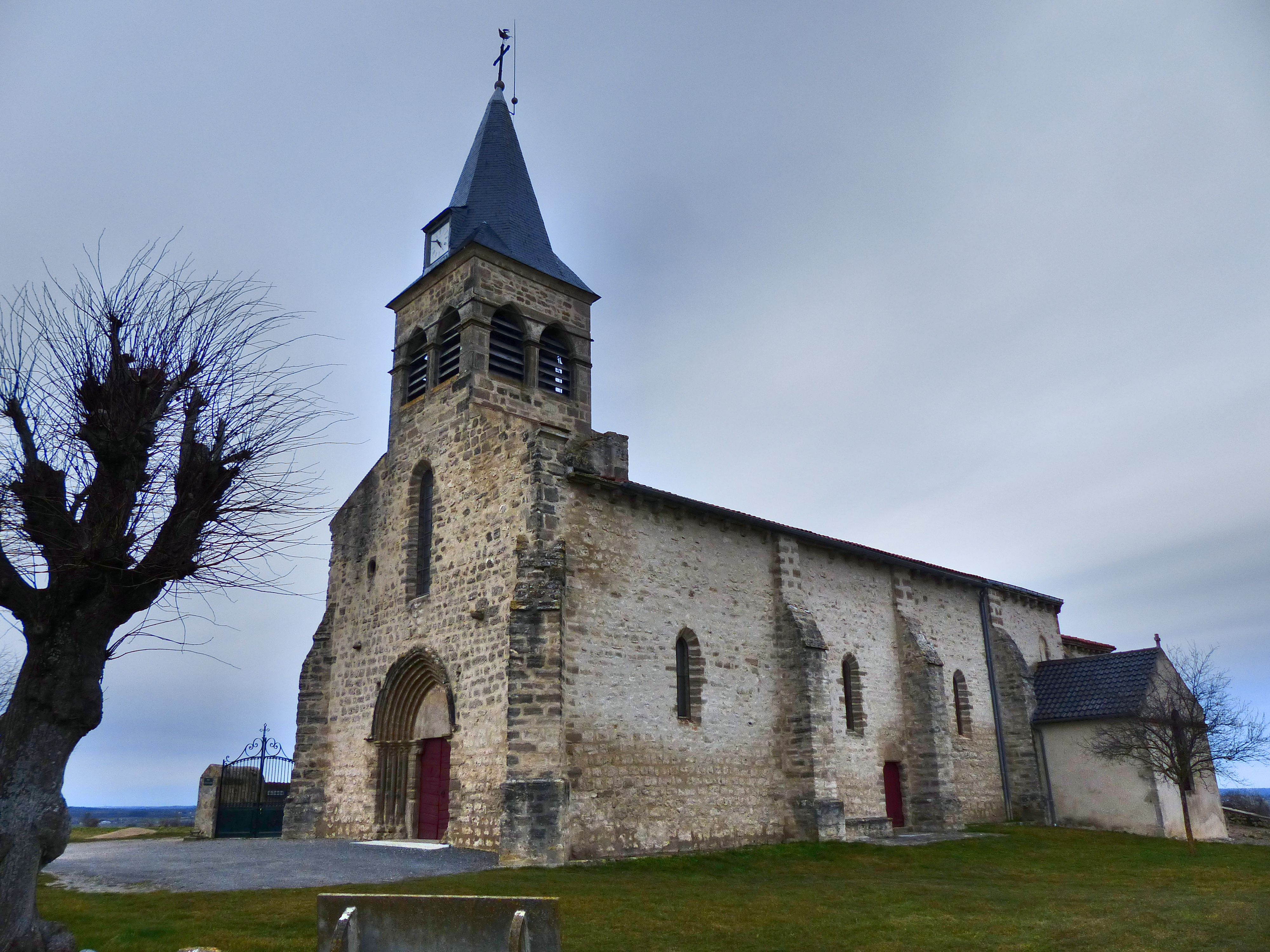 Église Saint-Pourçain de Naves (Allier), France